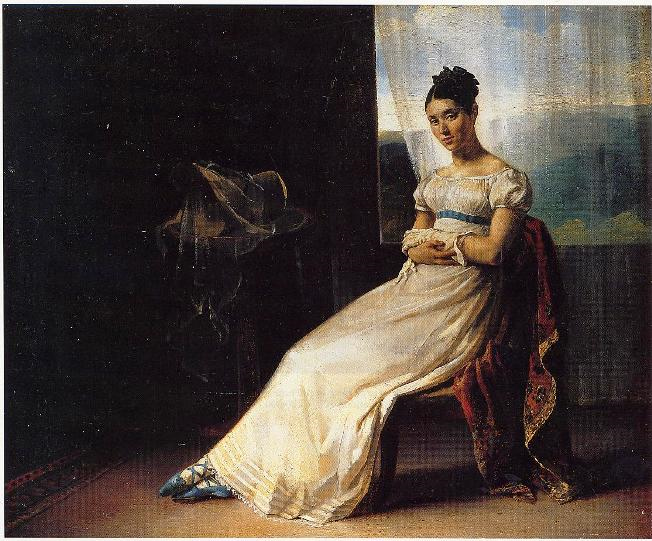 Portrait de Laure Bro de Comères par Géricault (XIXème siècle). Collection Particulière.